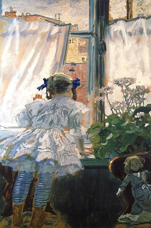 Кустодиев. Портрет дочери. 1910.